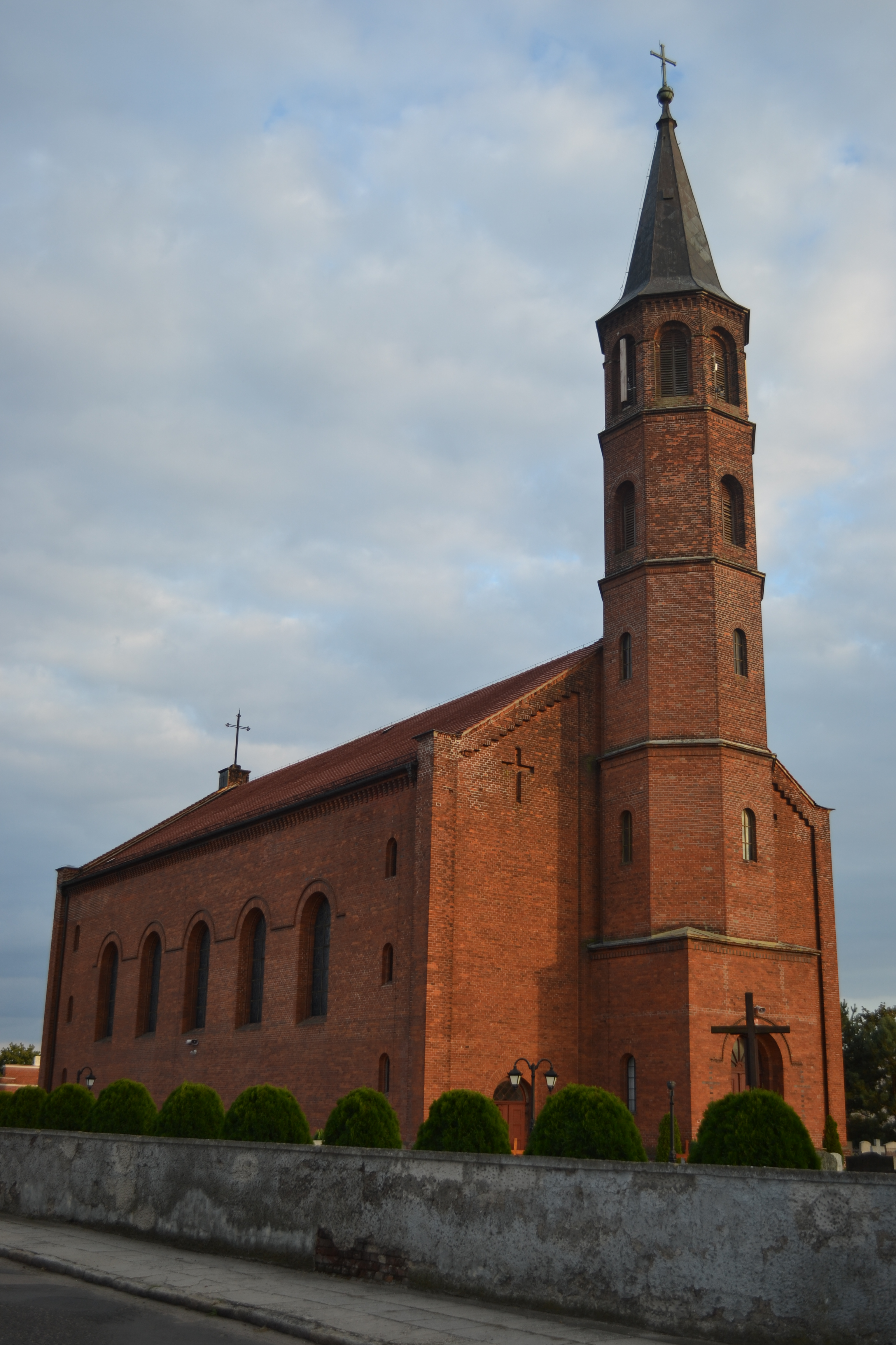 Kościół par. p. w. św. Rocha, mur., 1847 Przy kościele znajduje się cmentarz parafialny. Wokół kościoła i cmentarza znajduje się również mur, który będzie odnawiany (remontowany). Jest to trudne zadanie i długo nikt nie chciał się go podjąć, ponieważ kościół znajduje się na skarpie. numer: 637/59 z 13.11.1959